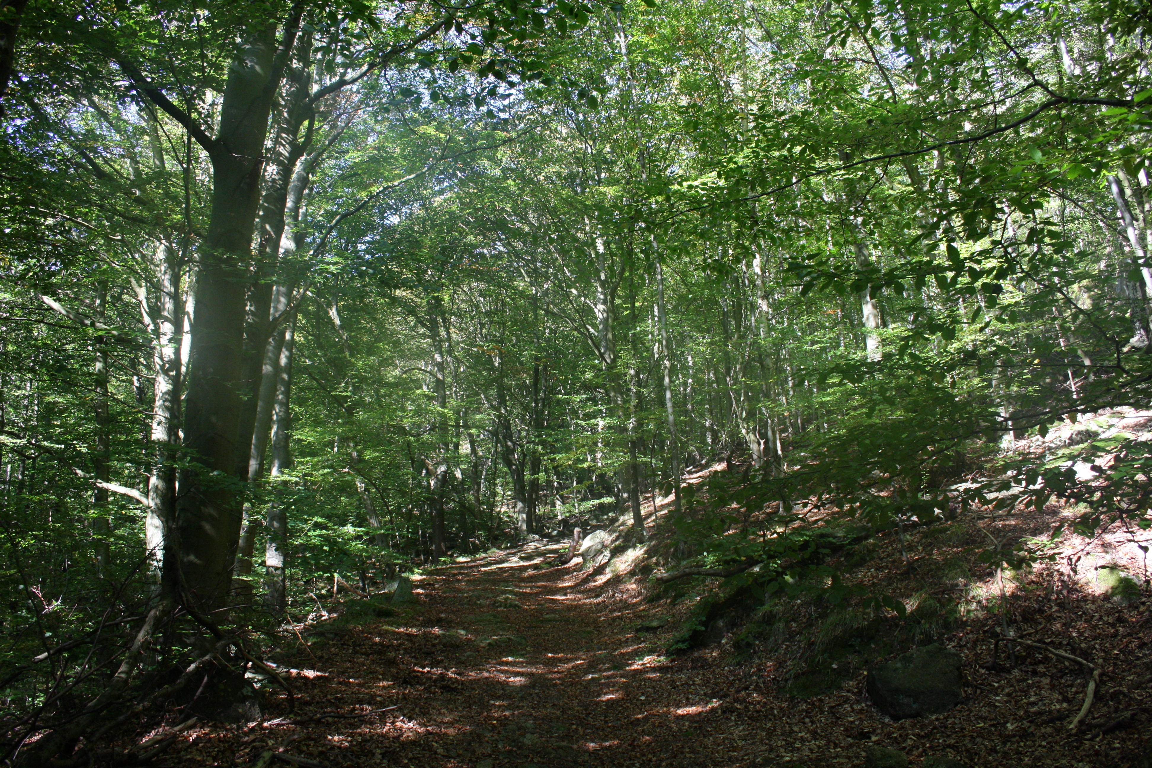 Harz Wanderung Stecklenberg - Hexentanzplatz / Thale - Vom Wurmtahl auf die Harzhochfläche